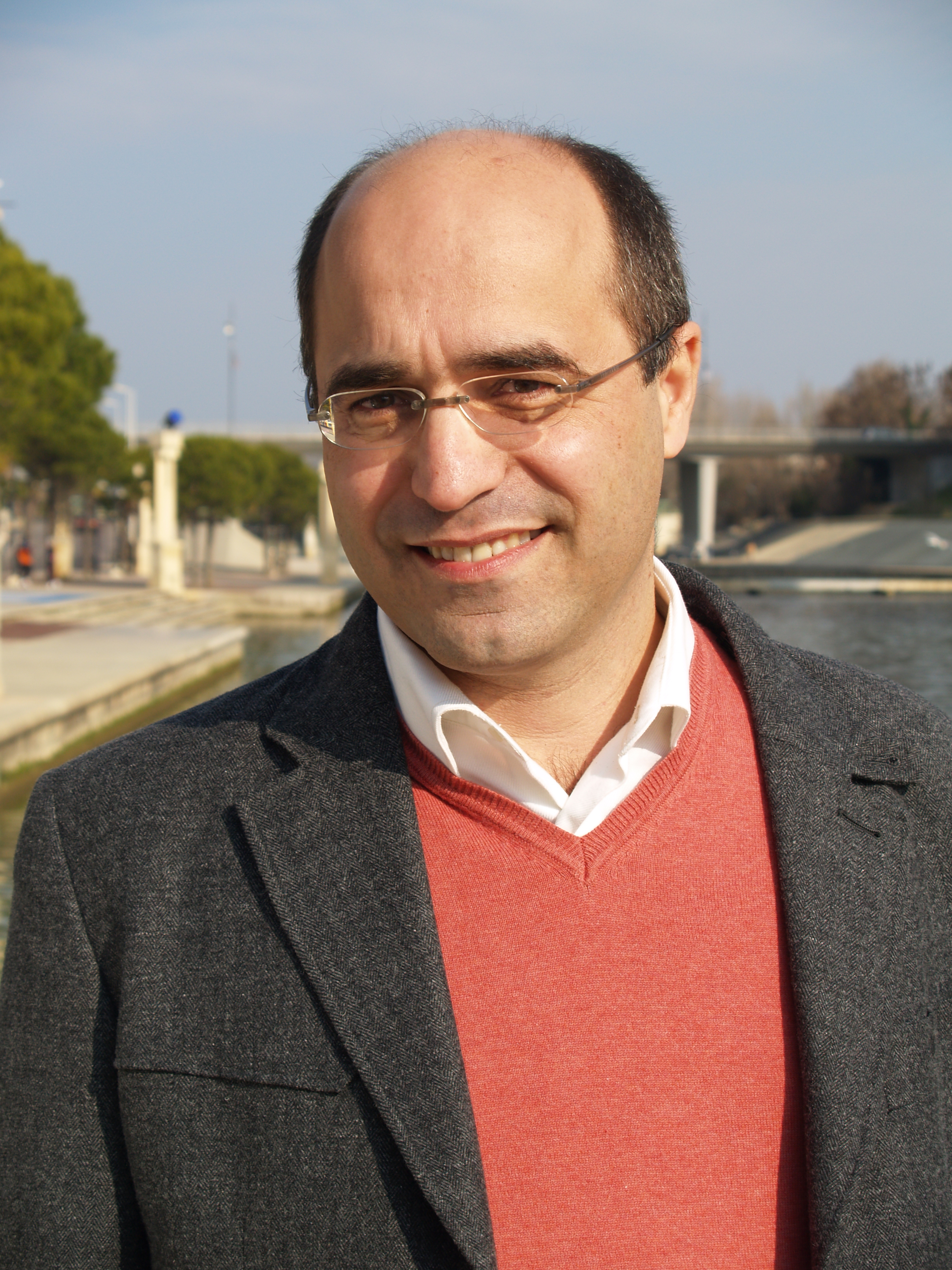 Jean-Louis Roumégas lors d'une rencontre avant les élections régionales françaises de 2010 devant le conseil régional à Montpellier de la région Languedoc-Roussilon.